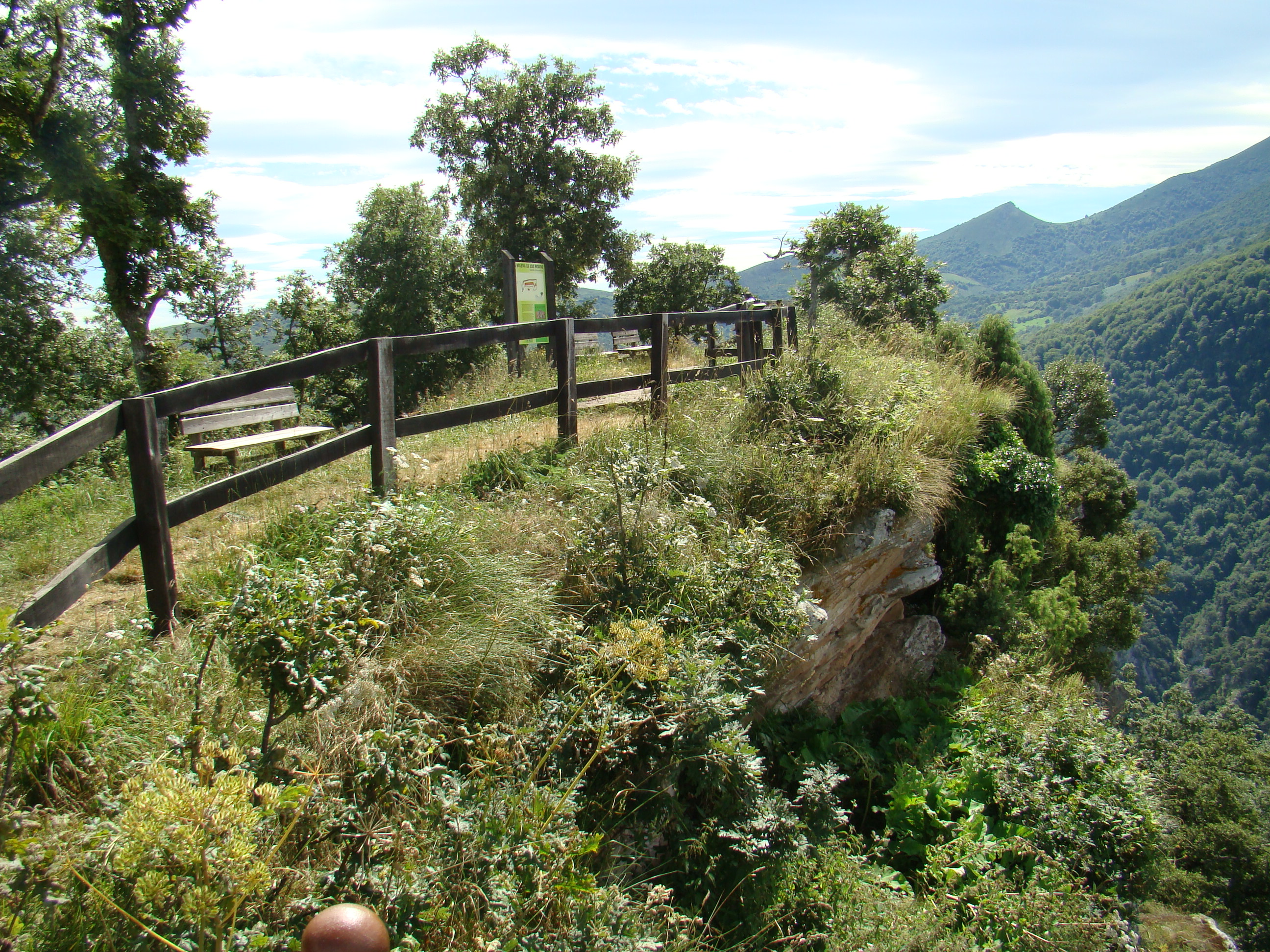 Lugar llamado Bolera de los Moros en Peñarrubia, Cantabria, España.